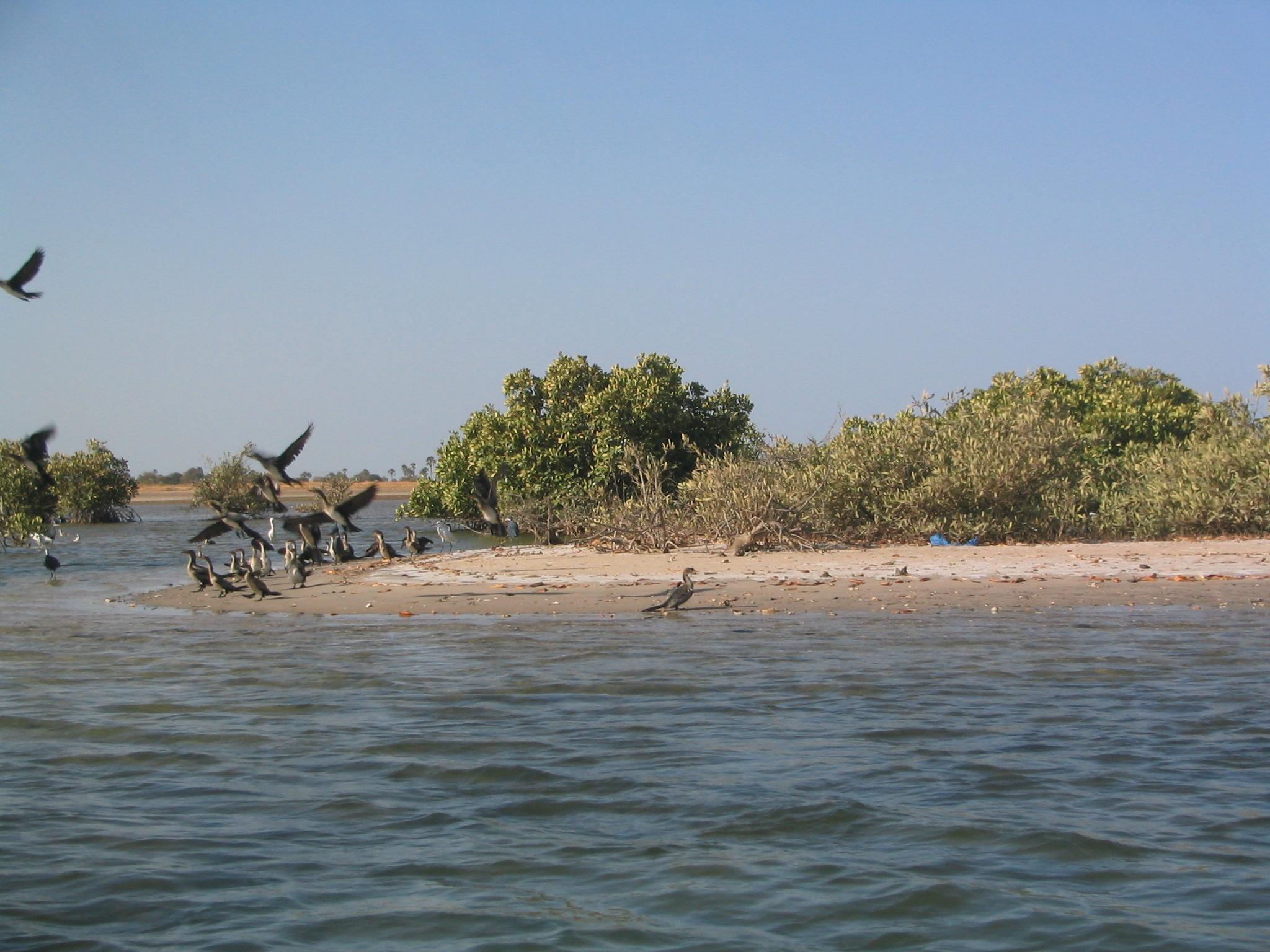 Mangrove à palétuvier et oiseaux au bord d'un bolong dans le Siné-Saloum, près de Mar Lodj (Sénégal)